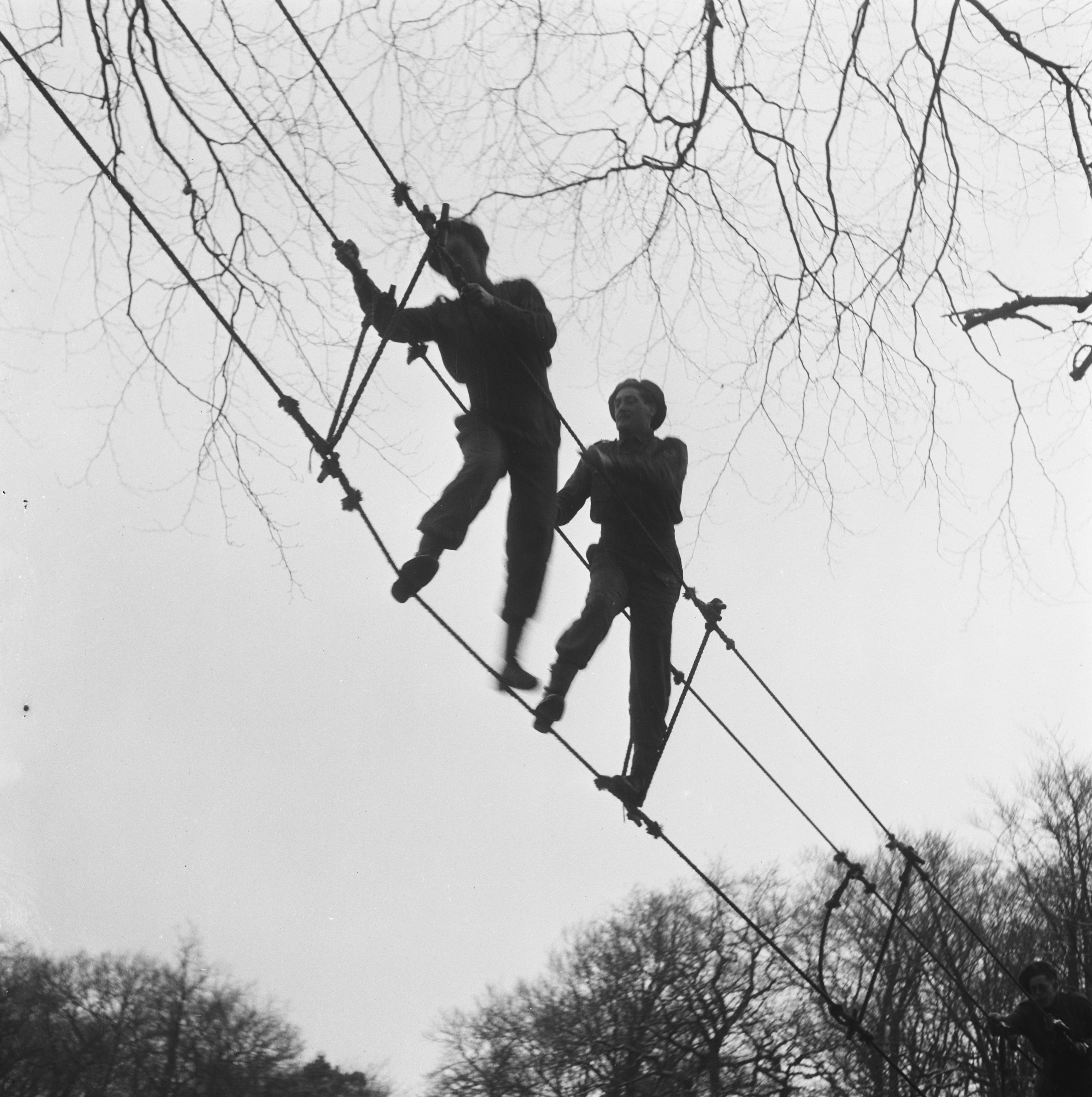 Collectie / Archief : Fotocollectie Anefo Reportage / Serie : [ onbekend ] Beschrijving : Generaal Kruls bezoekt officiers- en onderofficiersopleidingskamp in Bloemendaal Datum : 22 februari 1946 Locatie : Bloemendaal Persoonsnaam : Kruls, H.J. Fotograaf : Breijer, Charles / Anefo Auteursrechthebbende : Nationaal Archief Materiaalsoort : Negatief (zwart/wit) Nummer archiefinventaris : bekijk toegang 2.24.01.03 Bestanddeelnummer : 901-4951